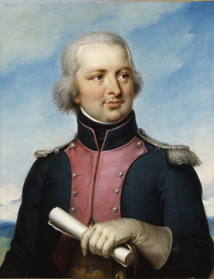 Commandé par Louis-Philippe pour le musée historique de Versailles en 1835